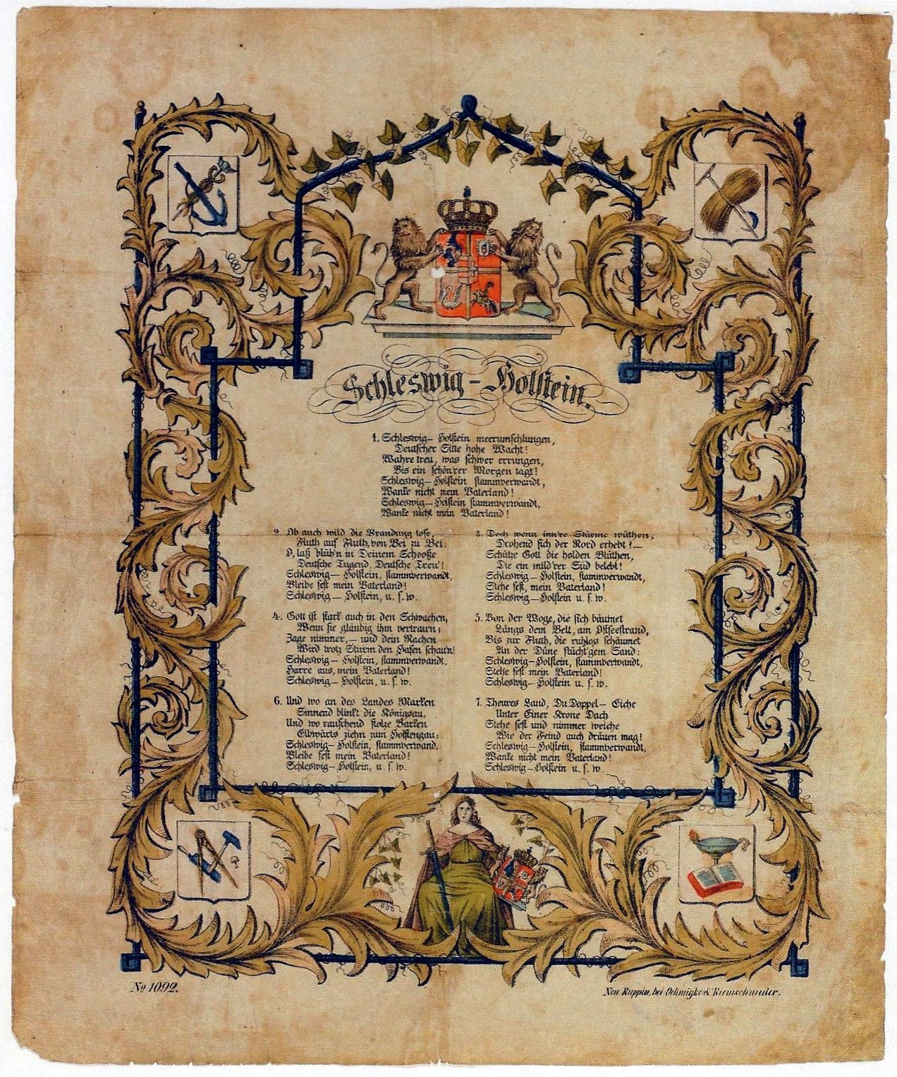 Kolorierte Lithographie des Schleswig-Holstein-Liedes (Nr. 1092. 41,2 x 34,2 cm)